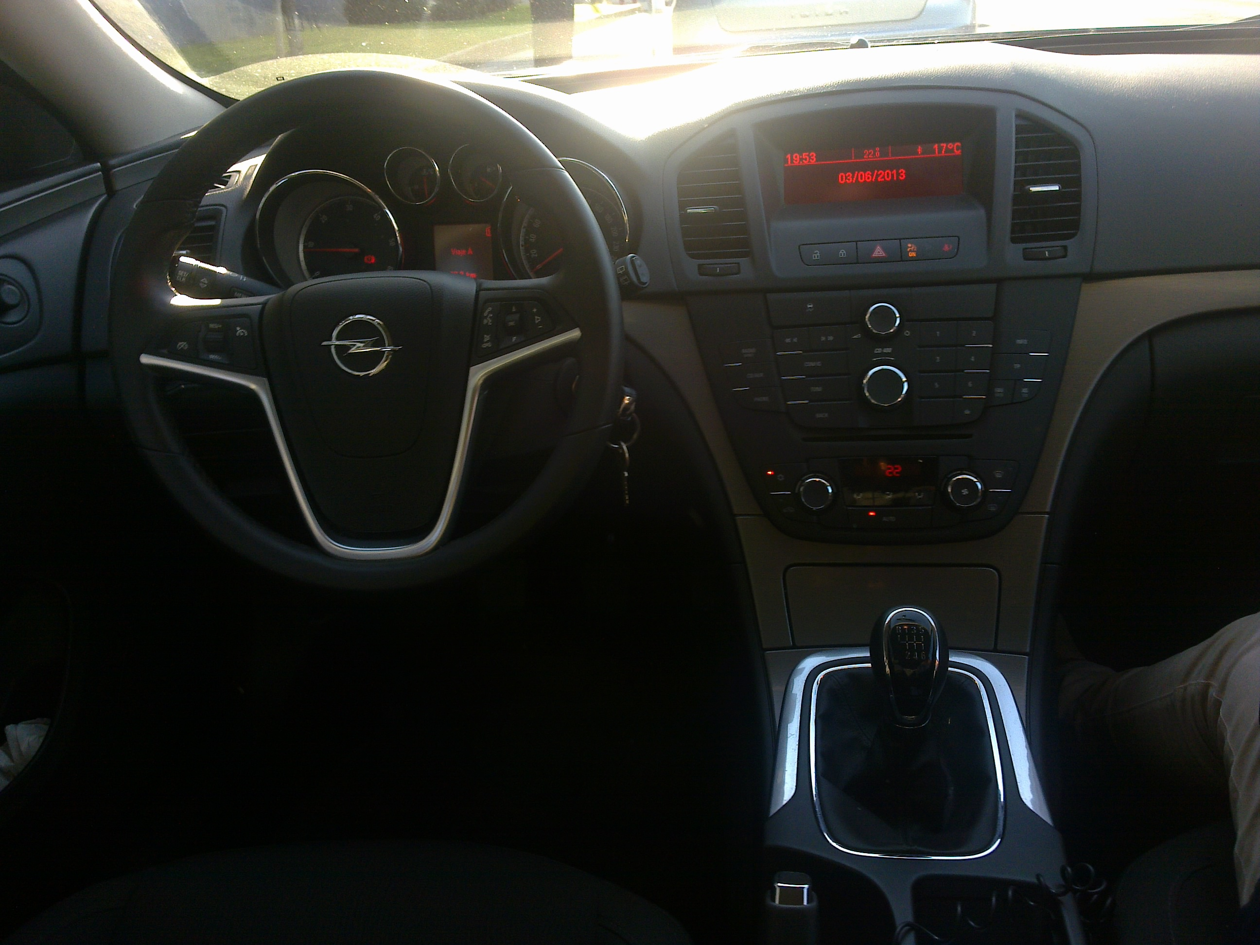 Opel Insignia barrutik.